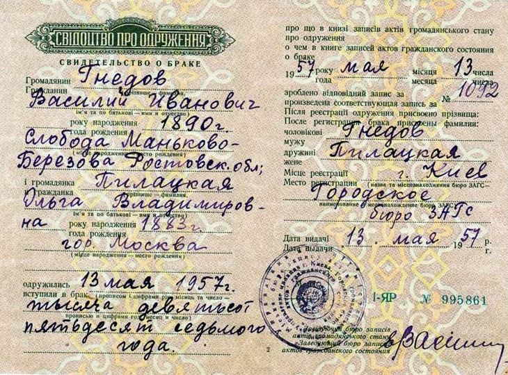 Свидетельство о заключении брака между Василием Ивановичем Гнедовым (известен как поэт Василиск Гнедов) и Ольгой Владимировной Пилацкой. Выдано Киевским городским бюро ЗАГС 13 мая 1957 года, то есть спустя 20 лет после расстрела Ольги Пилацкой.